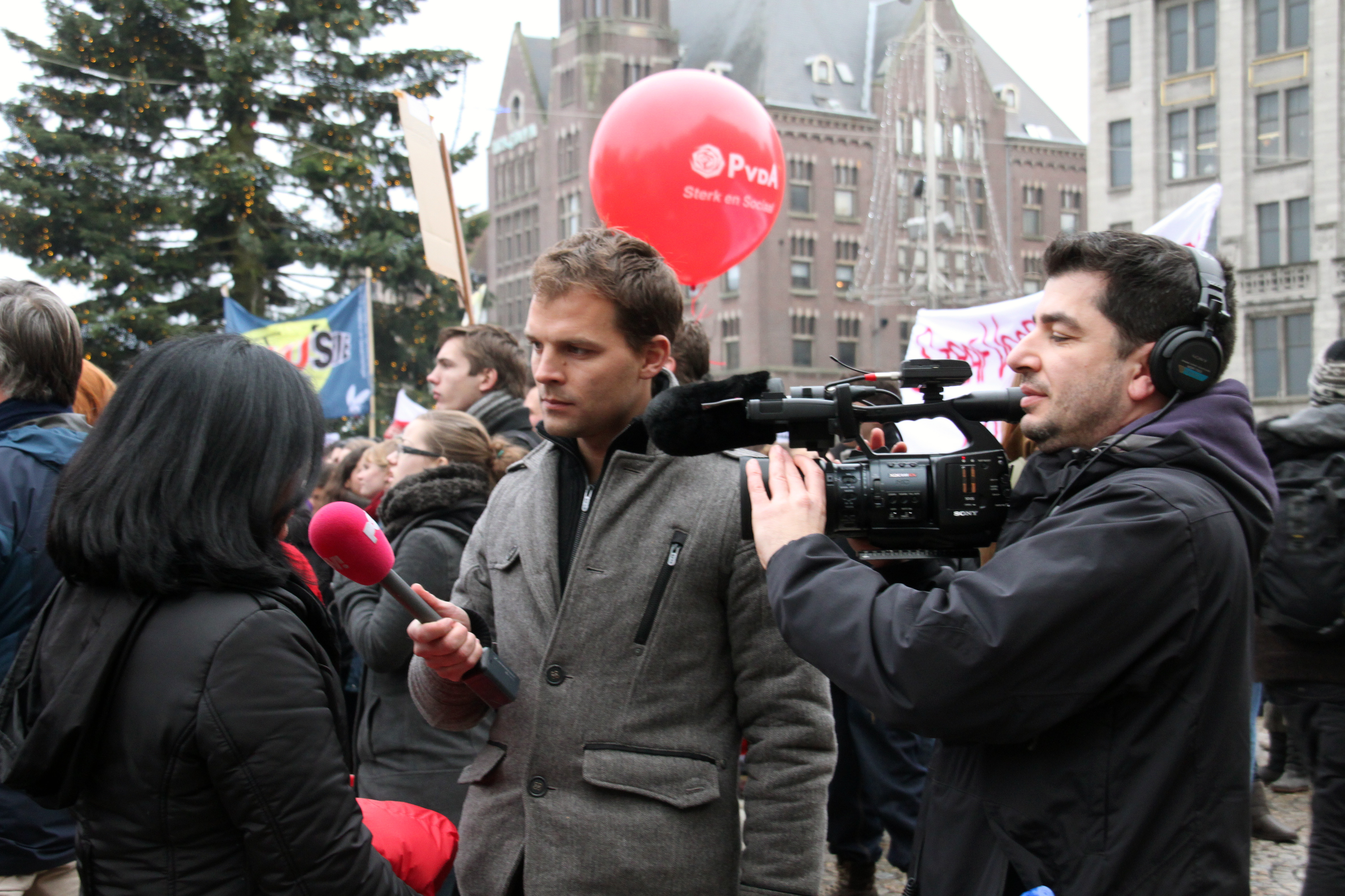 PowNews-verslaggever Daan Nieber stelt vragen aan een bijwoner van studentenprotesten tegen verhoogde studielasten eind 2010 op de Dam in Amsterdam.